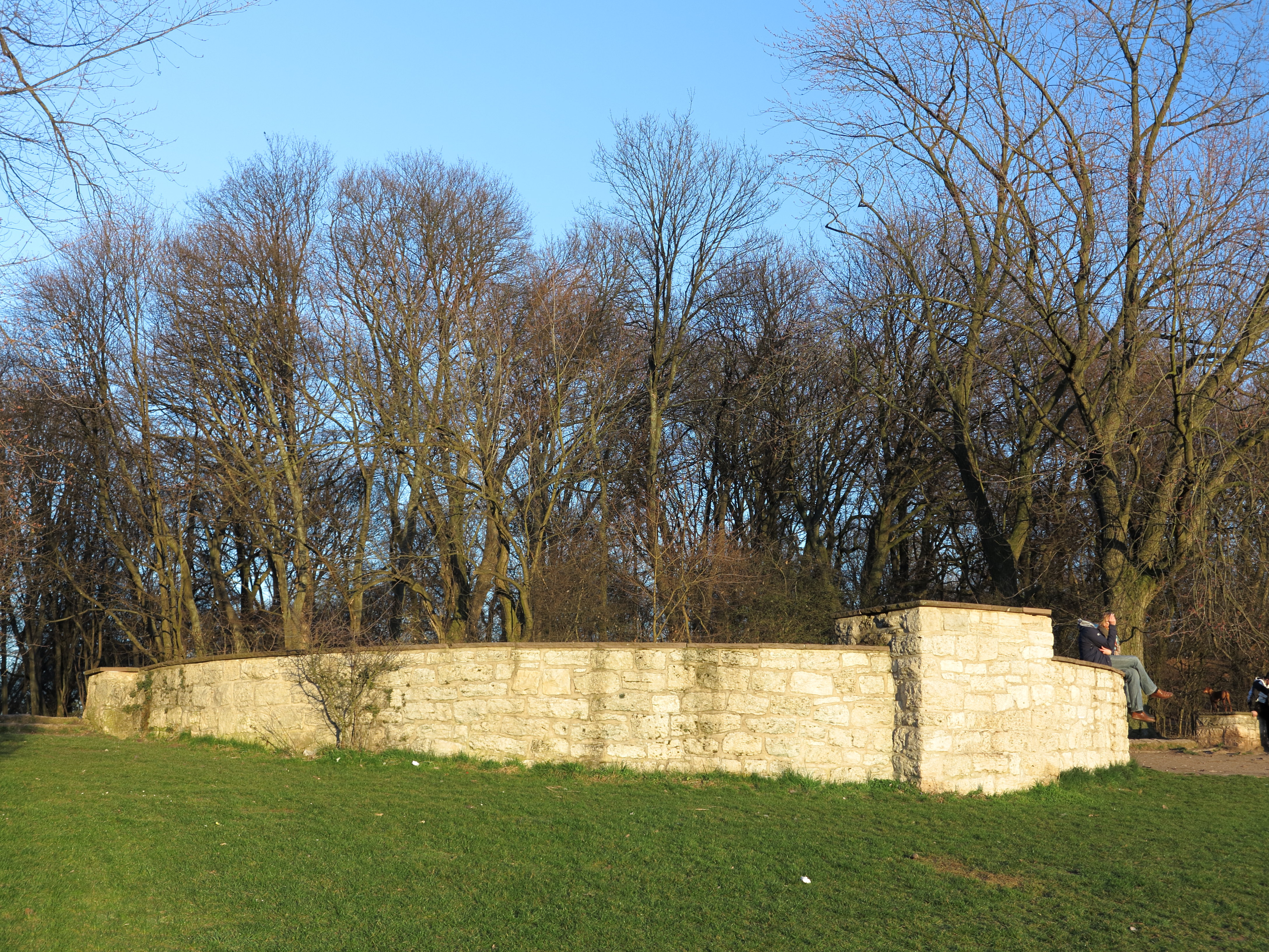 Braunschweig, Nußberg: die Rednerkanzel am ehemaligen Aufmarschfeld der SA